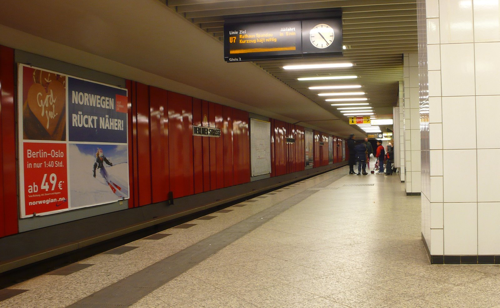 UBahnhof Berliner Strasse U7